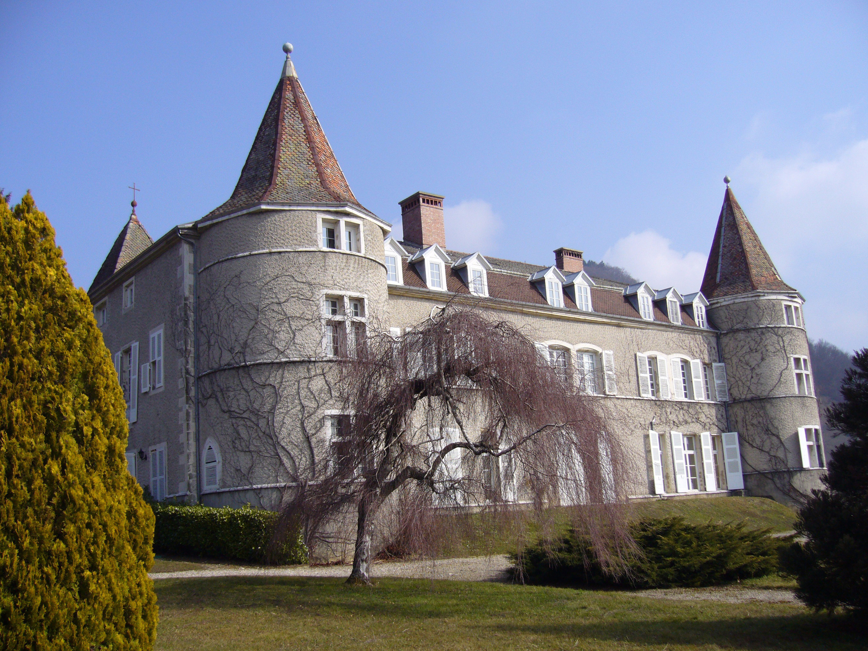 Château de Hautefort à St Nicolas de Macherin (Isère) Photo prise par Daniel Etienne